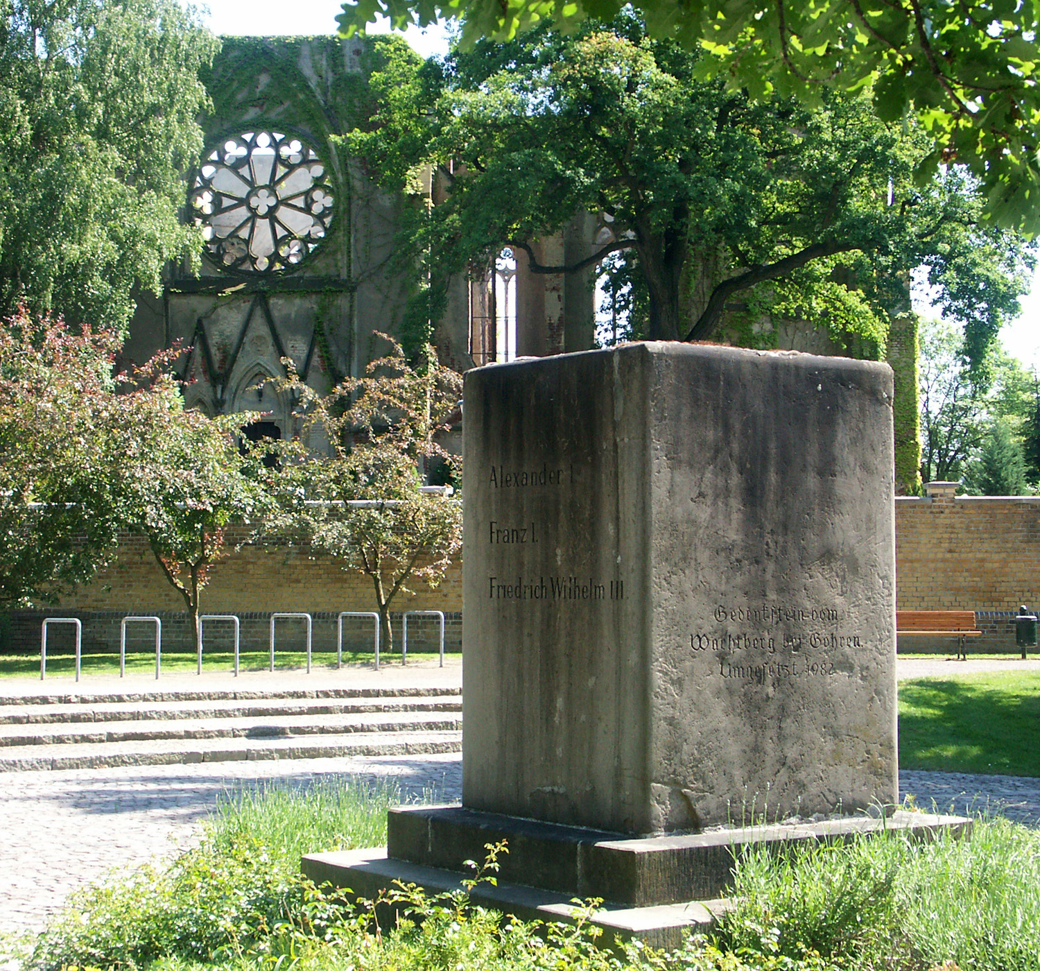 Gedenkstein an die Völkerschlacht 1813 Standpunkt der drei Monarchen am 16. Oktober 1813 auf dem Wachtberg bei Göhren (Magdeborn) 1982 umgesetzt nach Wachau